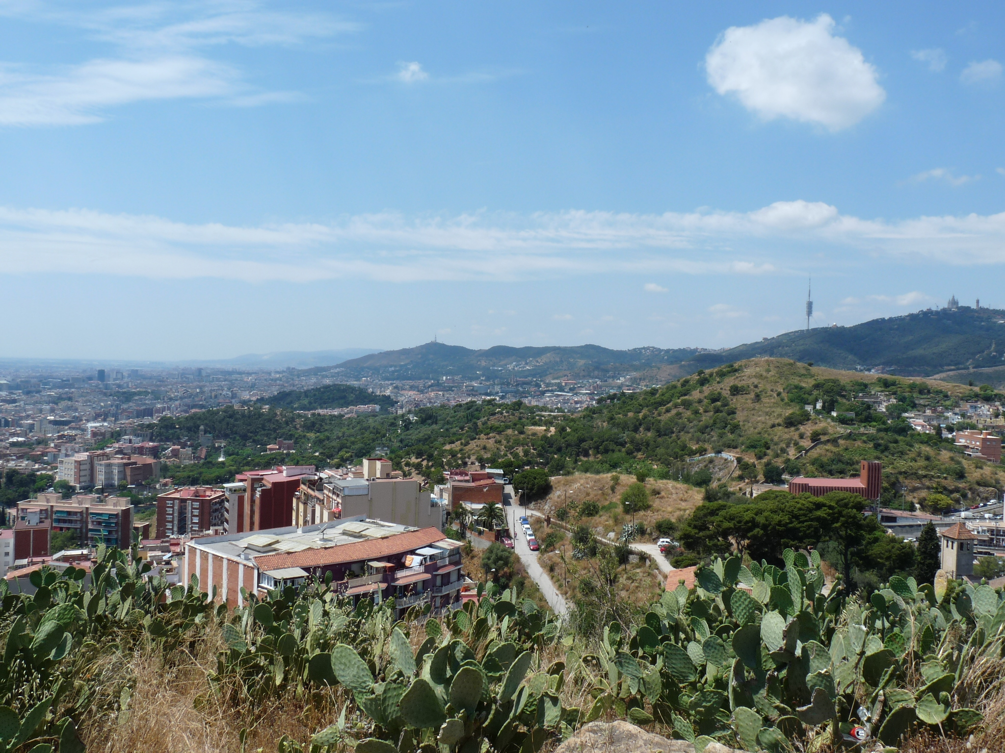 Paronàmica oest del turó de la Rovira, a primer terme el turó del carmel, a l'esquerra d'aquest el turó de les tres creus, una mica més a darrere d'aquest últim el turó del putget i a darrere de tot la serra de Collserola